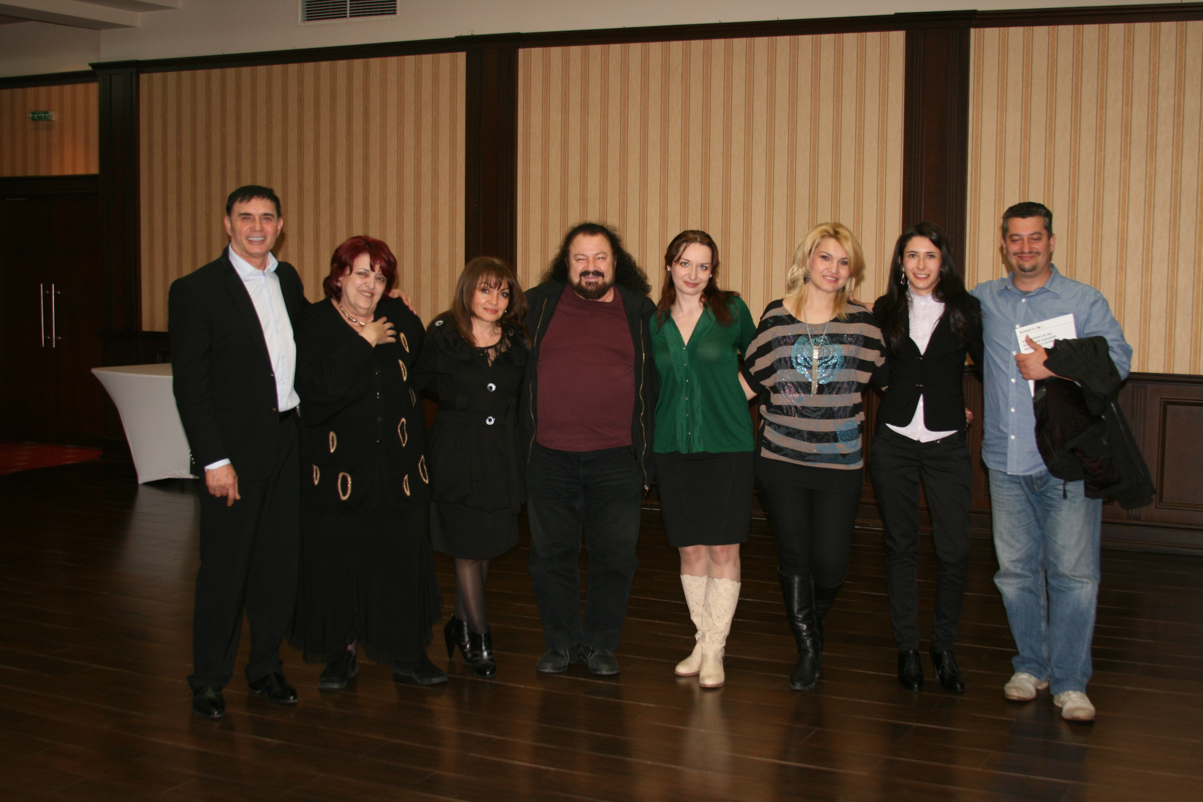 Димитър Куцаров с Калуди Калудов и Христина Ангелакова